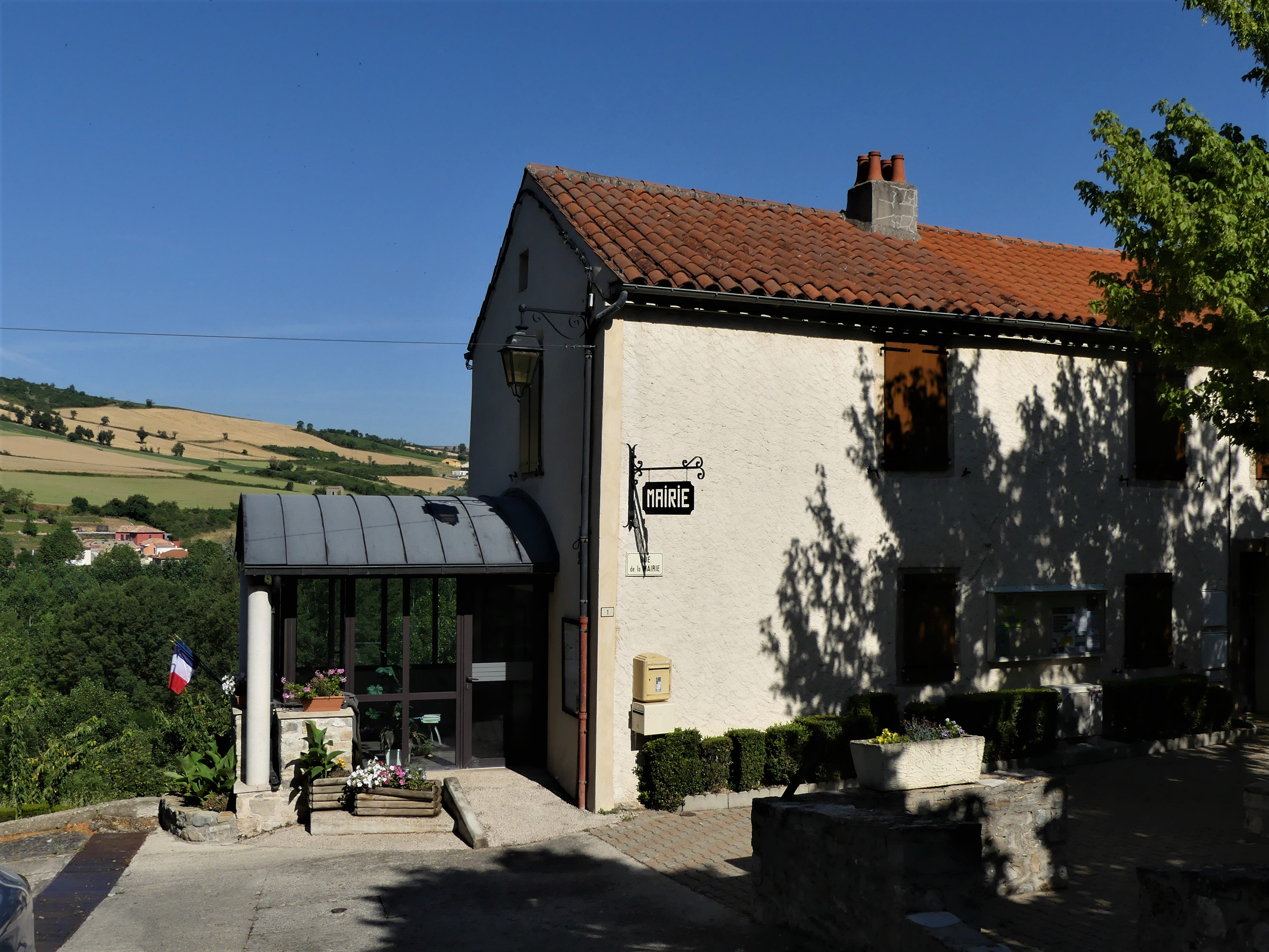 La mairie de Paulhe, Aveyron, France.